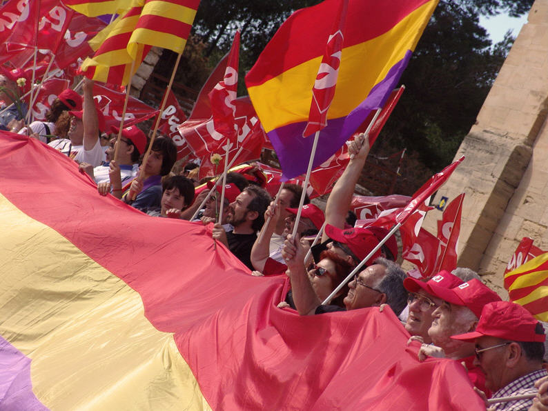 Republicanos de EUiA en Terres de l'Ebre